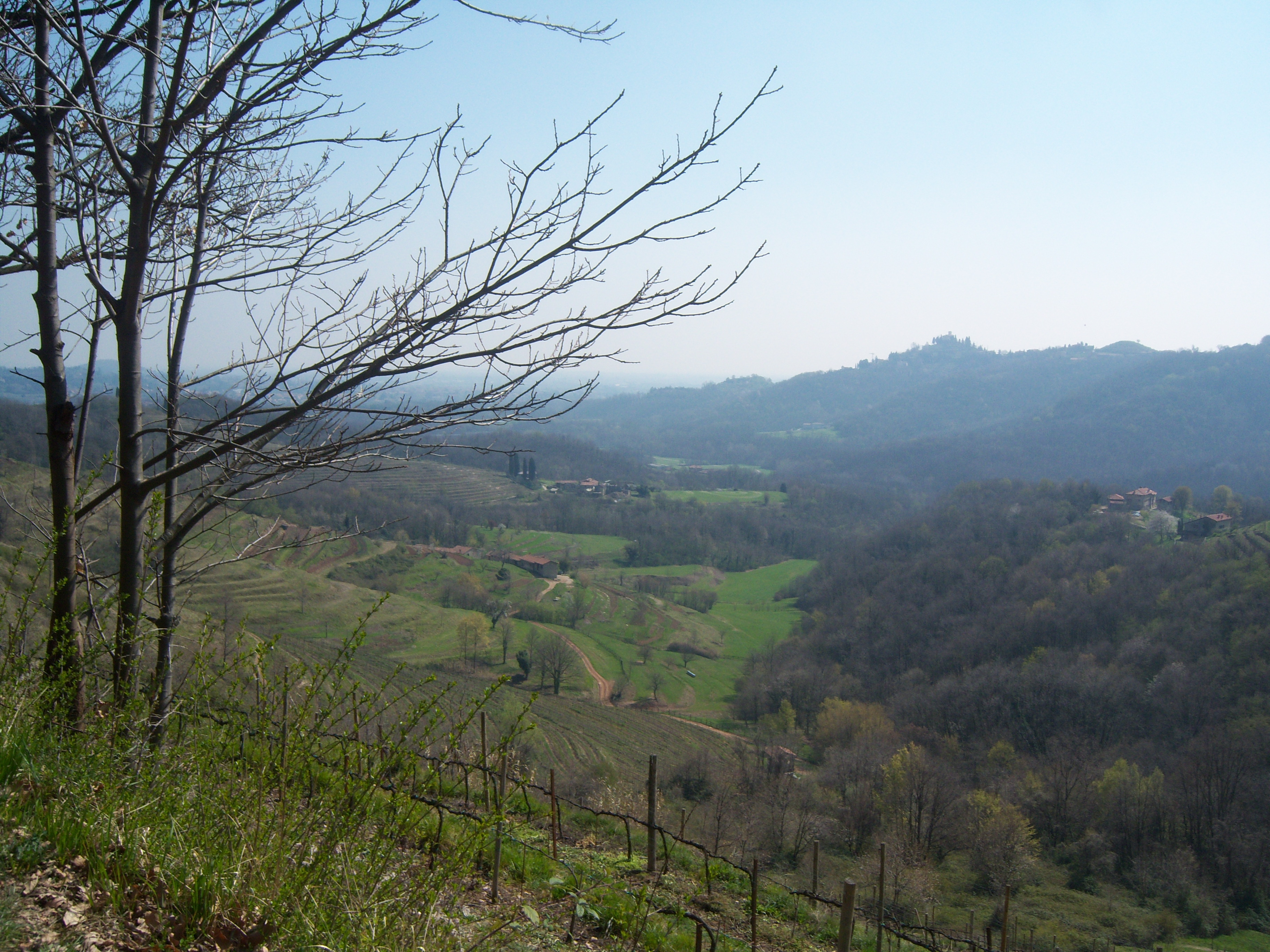 Val Curone